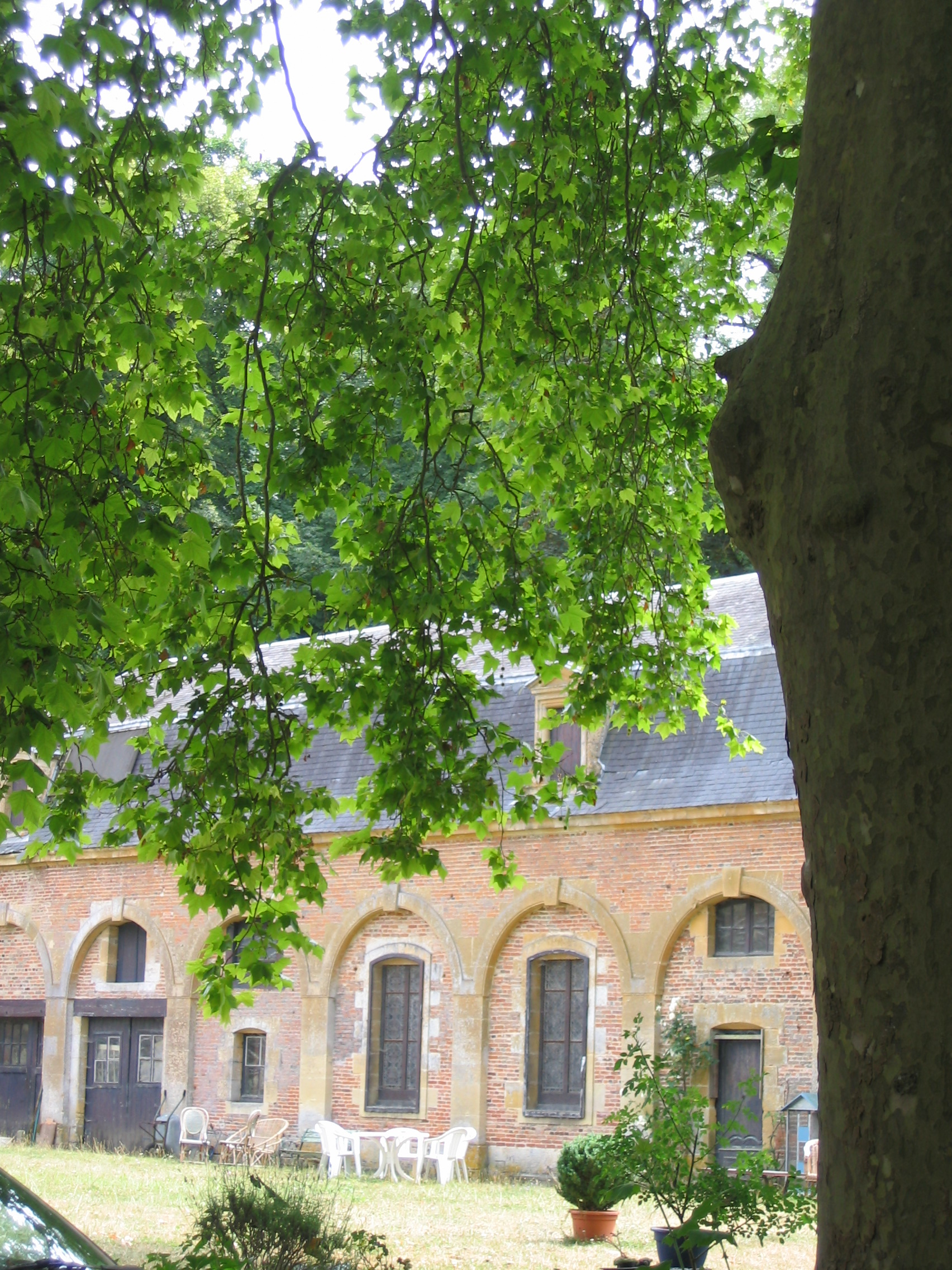 Bâtiment en longueur avec un toit à la Mansard, ancien commun (bâtiment de droite en regardant la façade principale)